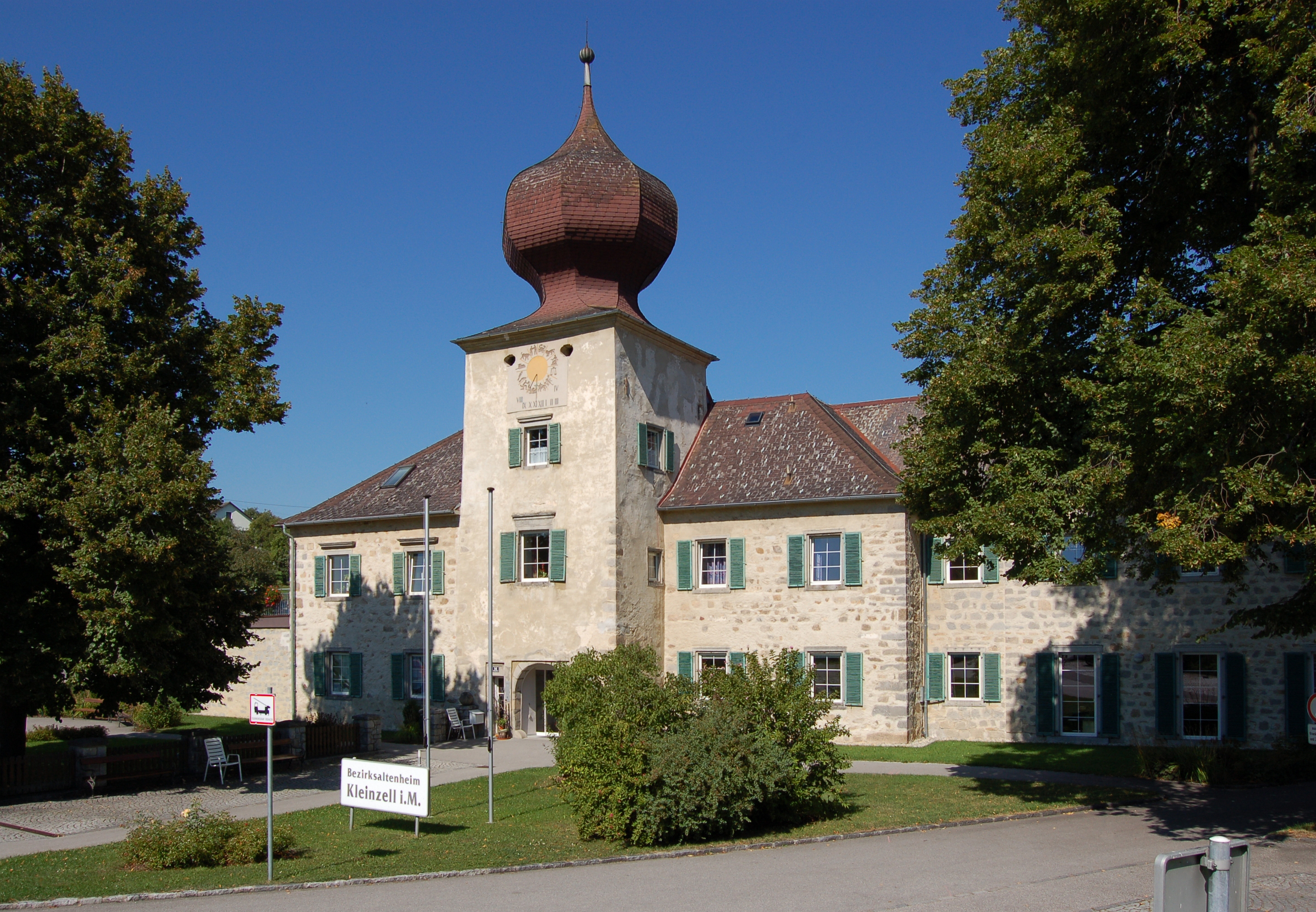 Bezirksaltenheim, ehemaliges Schloss Gneisenau. Das ehemalige Wasserschloss ist ein zweigeschoßiger, U-förmiger Bau mit dreigeschoßigem Turm, Laubengang und Arkaden. Das Bauwerk stammt aus dem 15. bis 16. Jahrhundert mit späteren Umbauten. The making of this work was supported by Wikimedia Austria. For other files made with the support of Wikimedia Austria, please see the category Supported by Wikimedia Österreich.